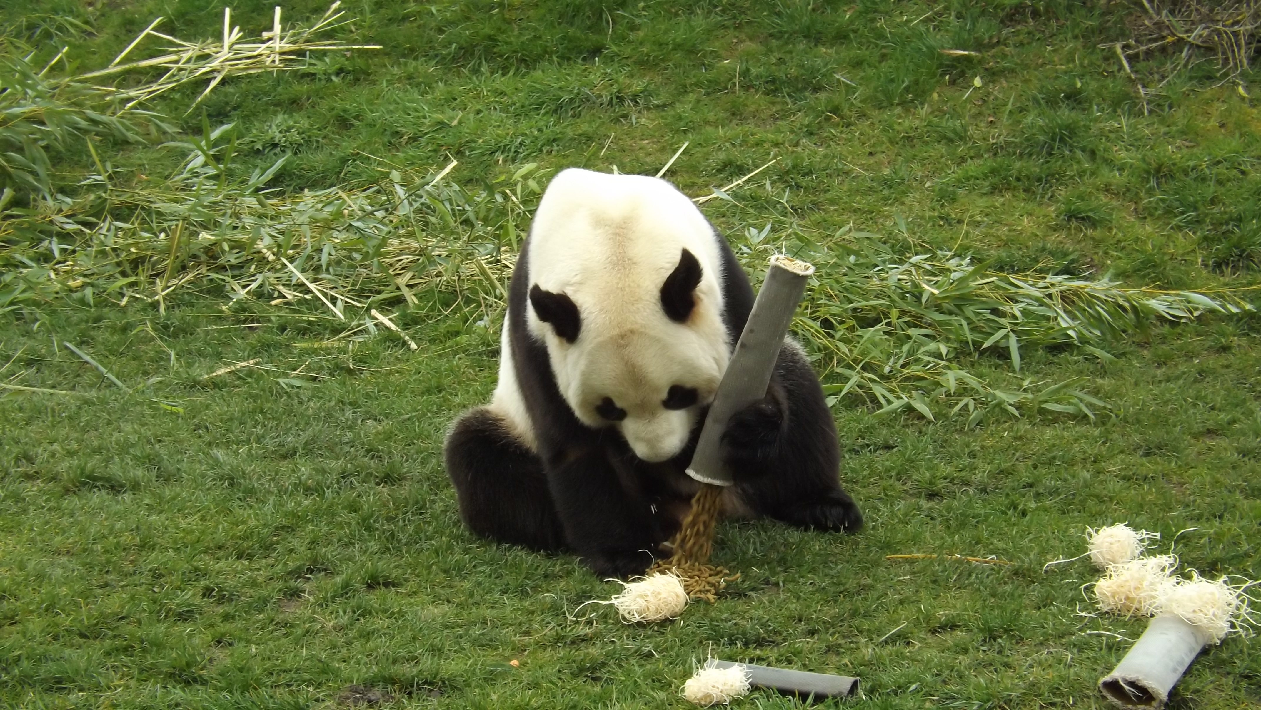 Enrichissement du milieu du panda géant mâle Yuan Zi, au ZooParc de Beauval, en France.